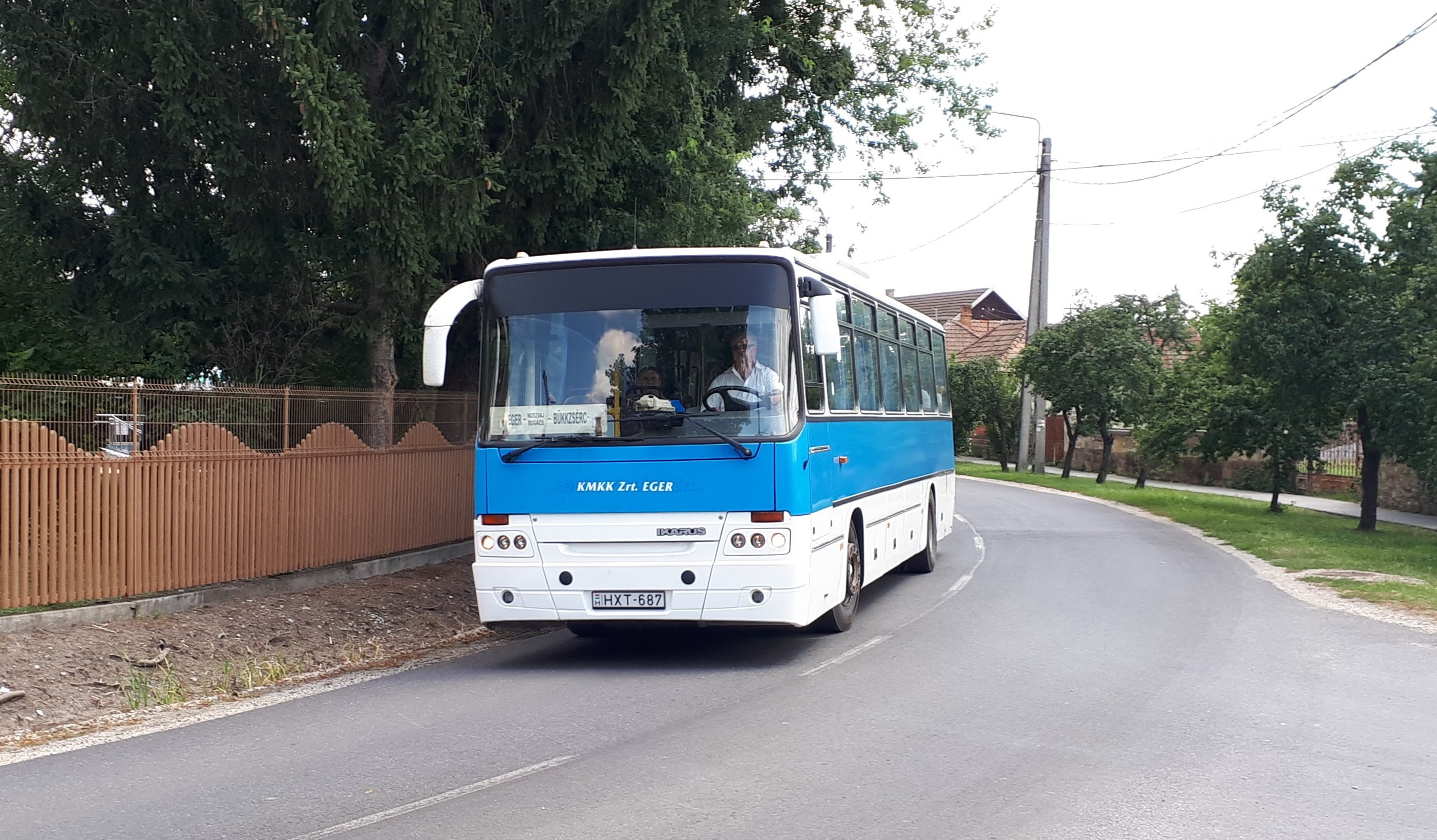 A KMKK HXT-687 rendszámú Ikarus C56 típusú busza Bogácson, a 3417-es helyközi járaton.